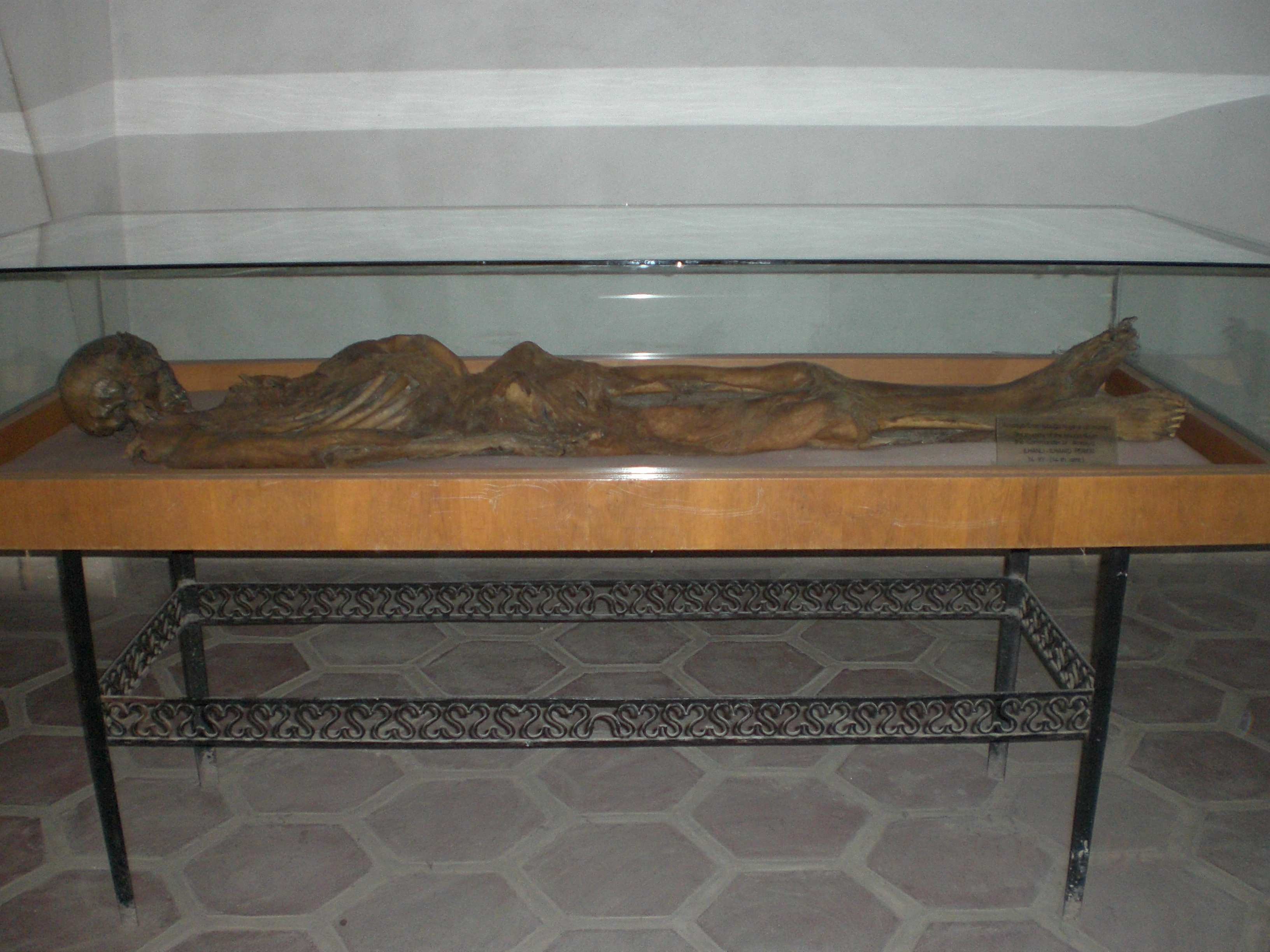 Amasya Emiri İşbuğa Nuyin'e ait mumya